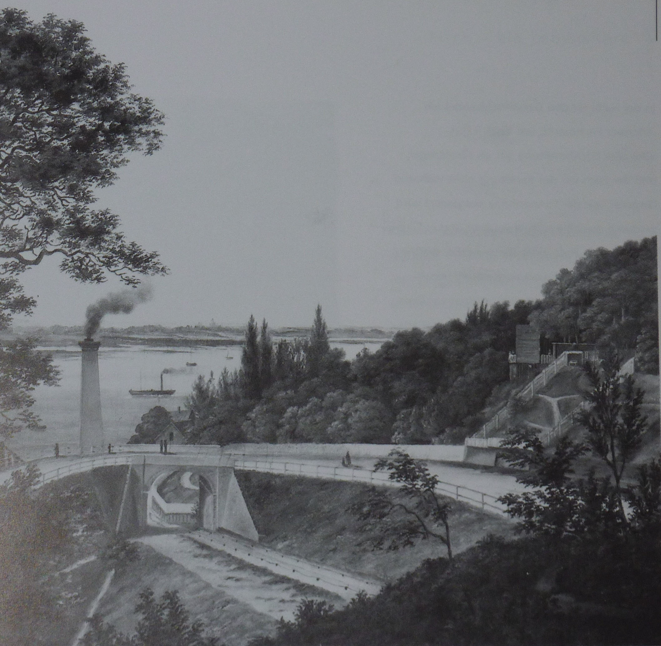 auf der geneigten Ebene wurden in Altona Waren zwischen Elbe und Bahnanschluss transportiert